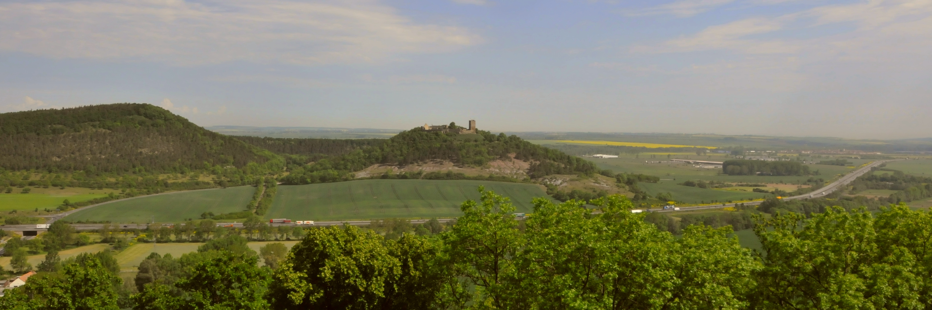 Blick von der Mühlburg zu Burg Gleichen